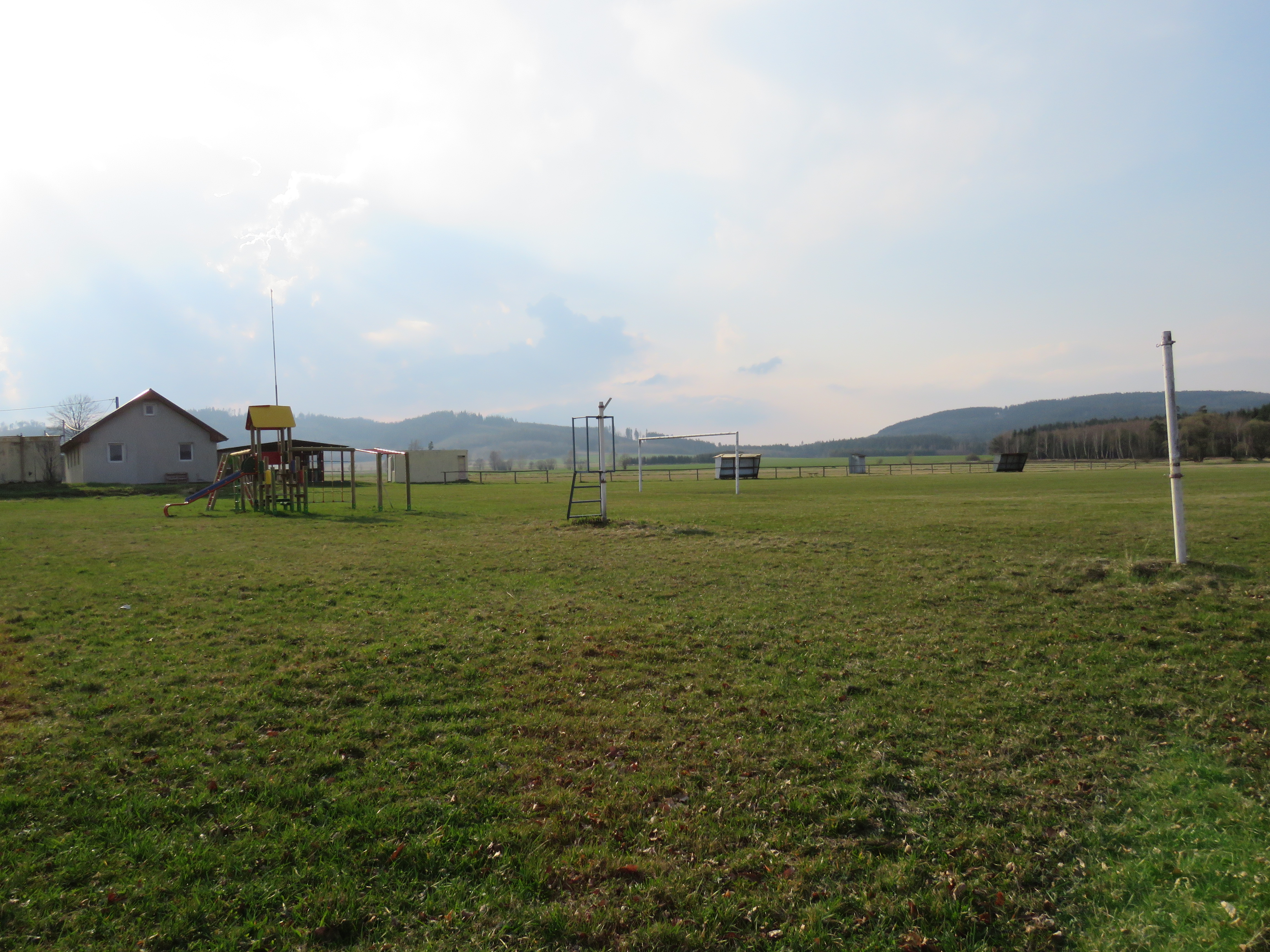 Boisko klubu „Orły Lipienica”.